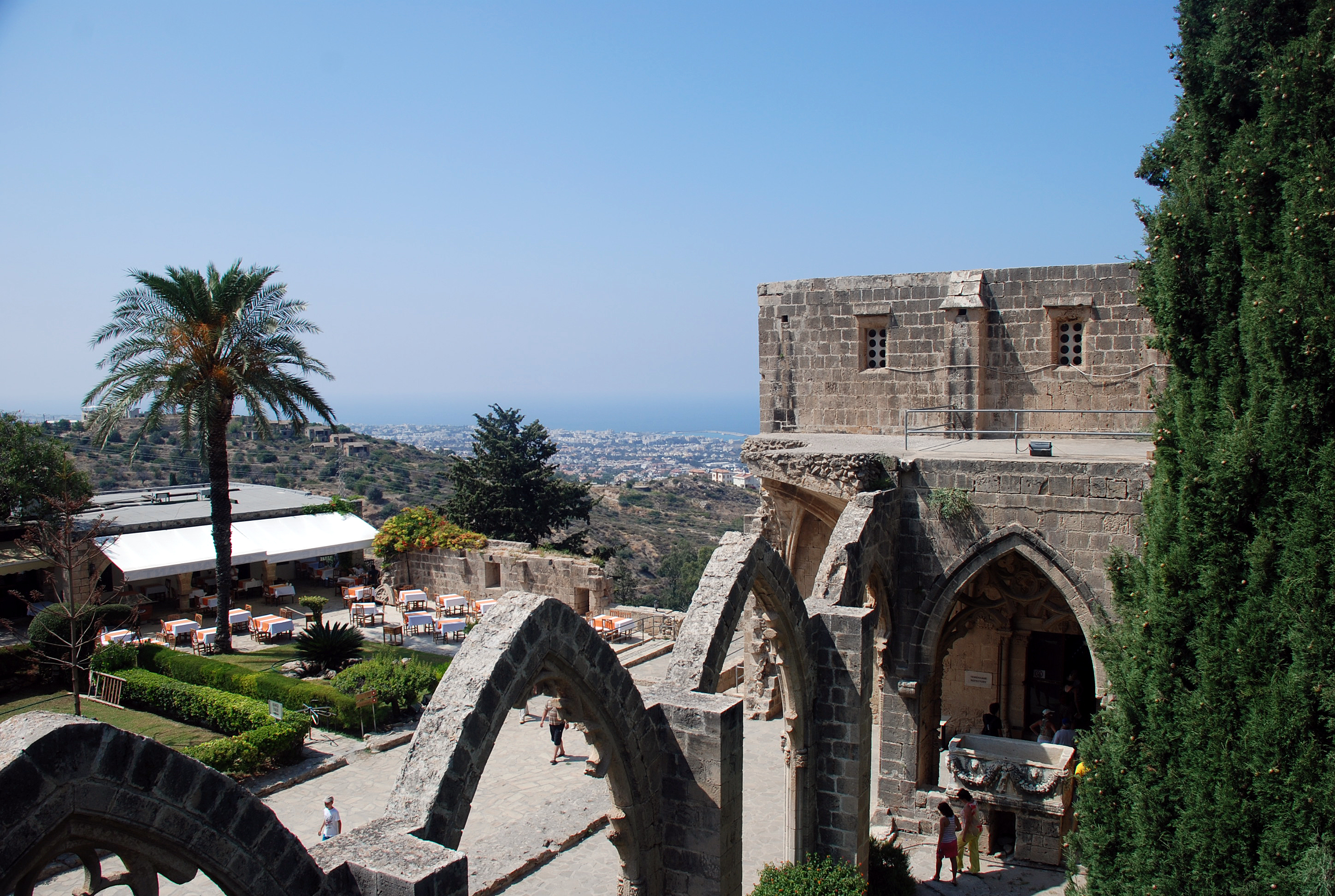 Bellapais, Girne, Nordzypern: Blick von der Decke des Kreuzganges über den Hof zum Restaurantbereich